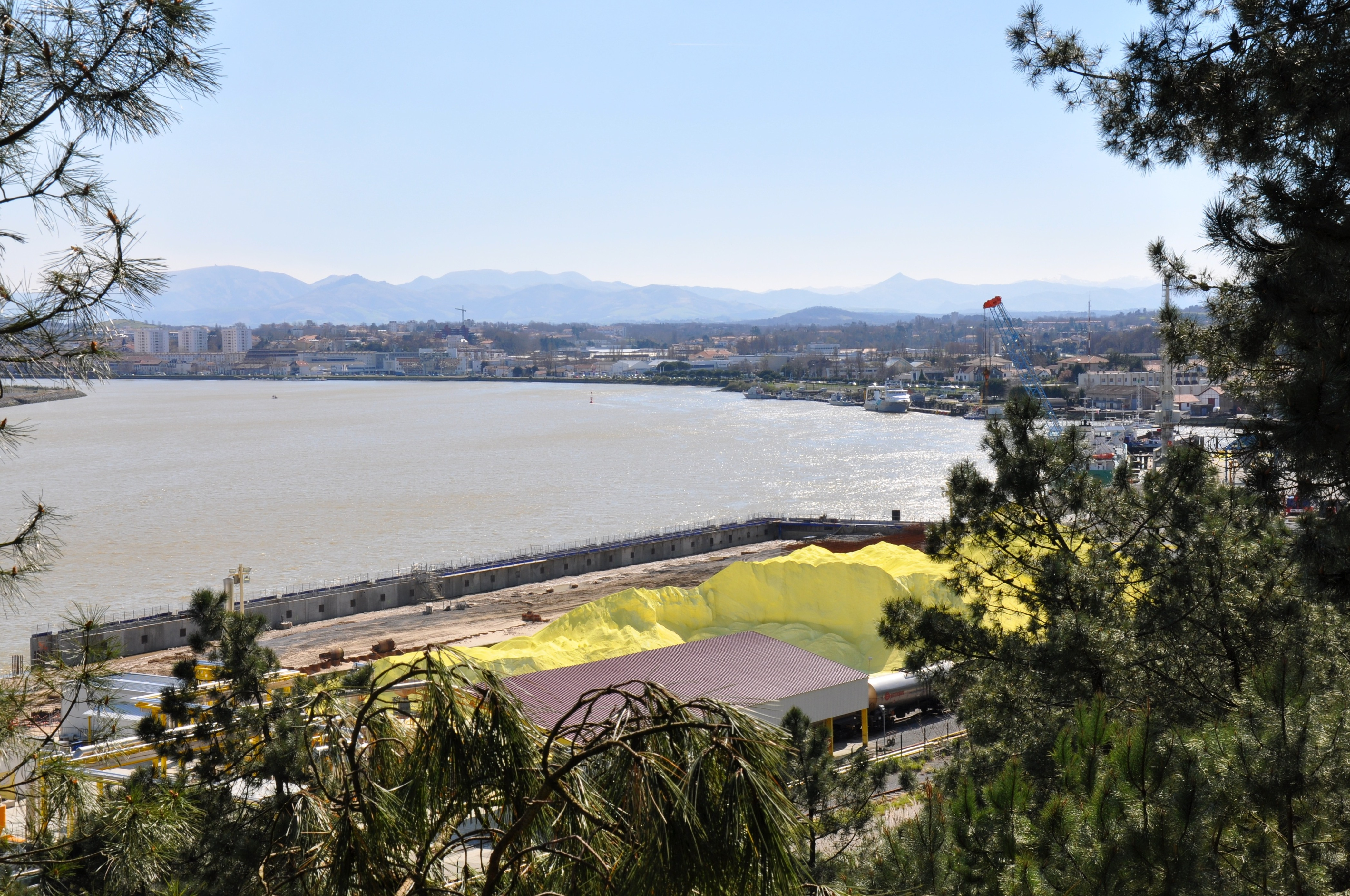 Forêt du Lazaret - souffre